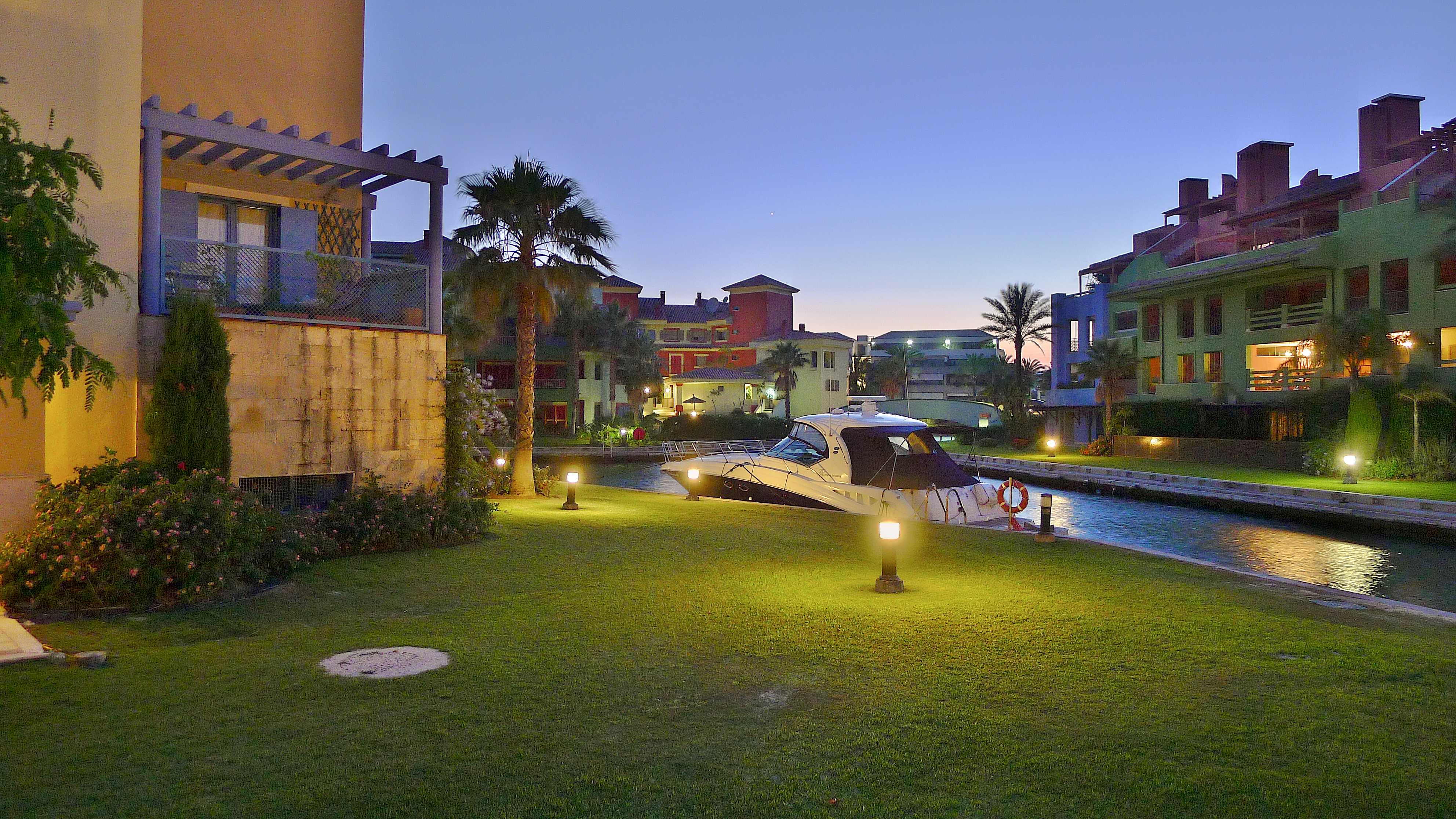 Vista nocturna del urbanismo